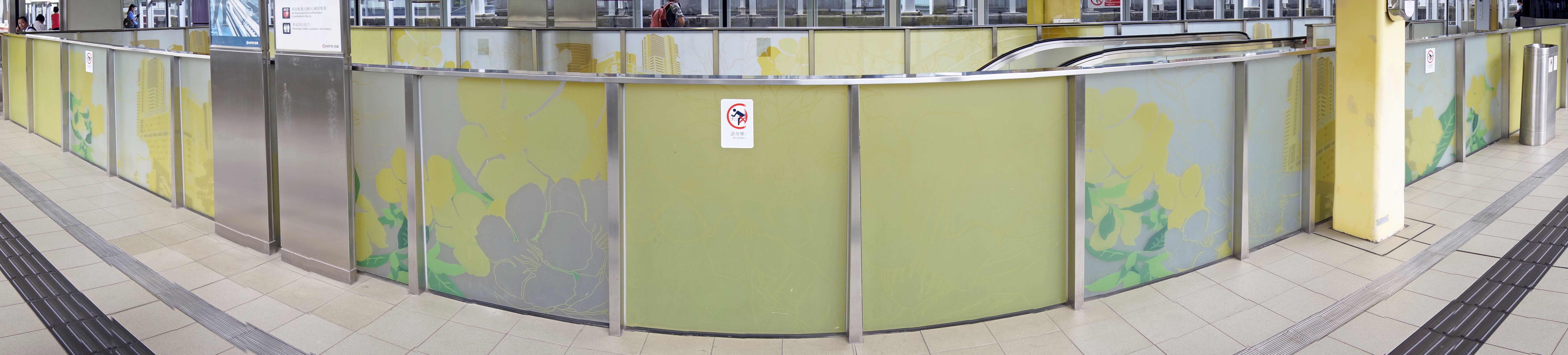 港鐵石門站月台佈置全景圖